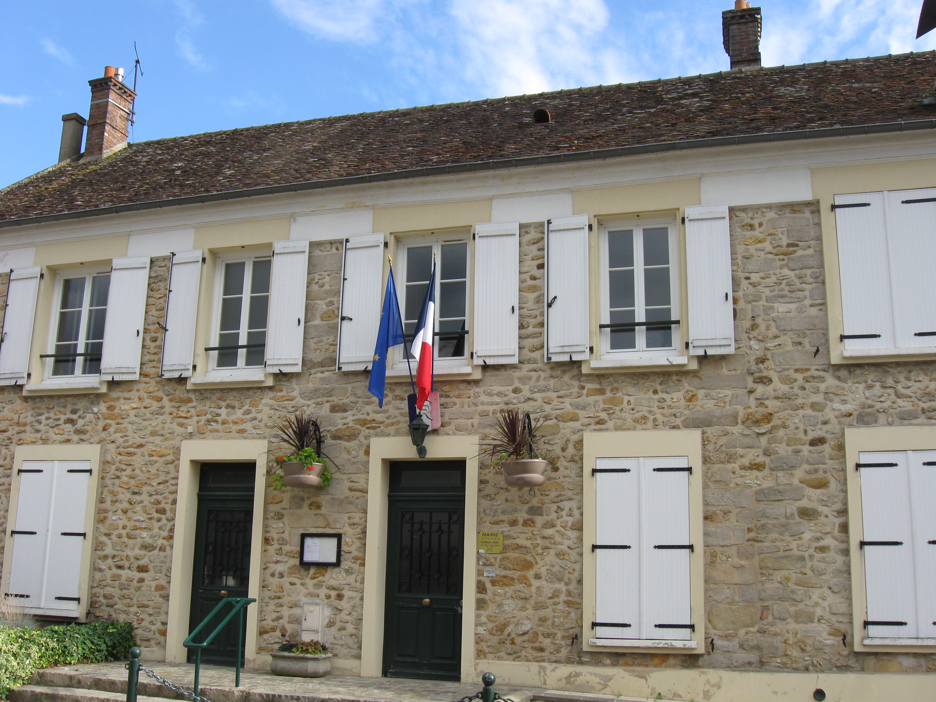 Mairie de Sivry-Courtry. (Seine-et-Marne, région Île-de-France).